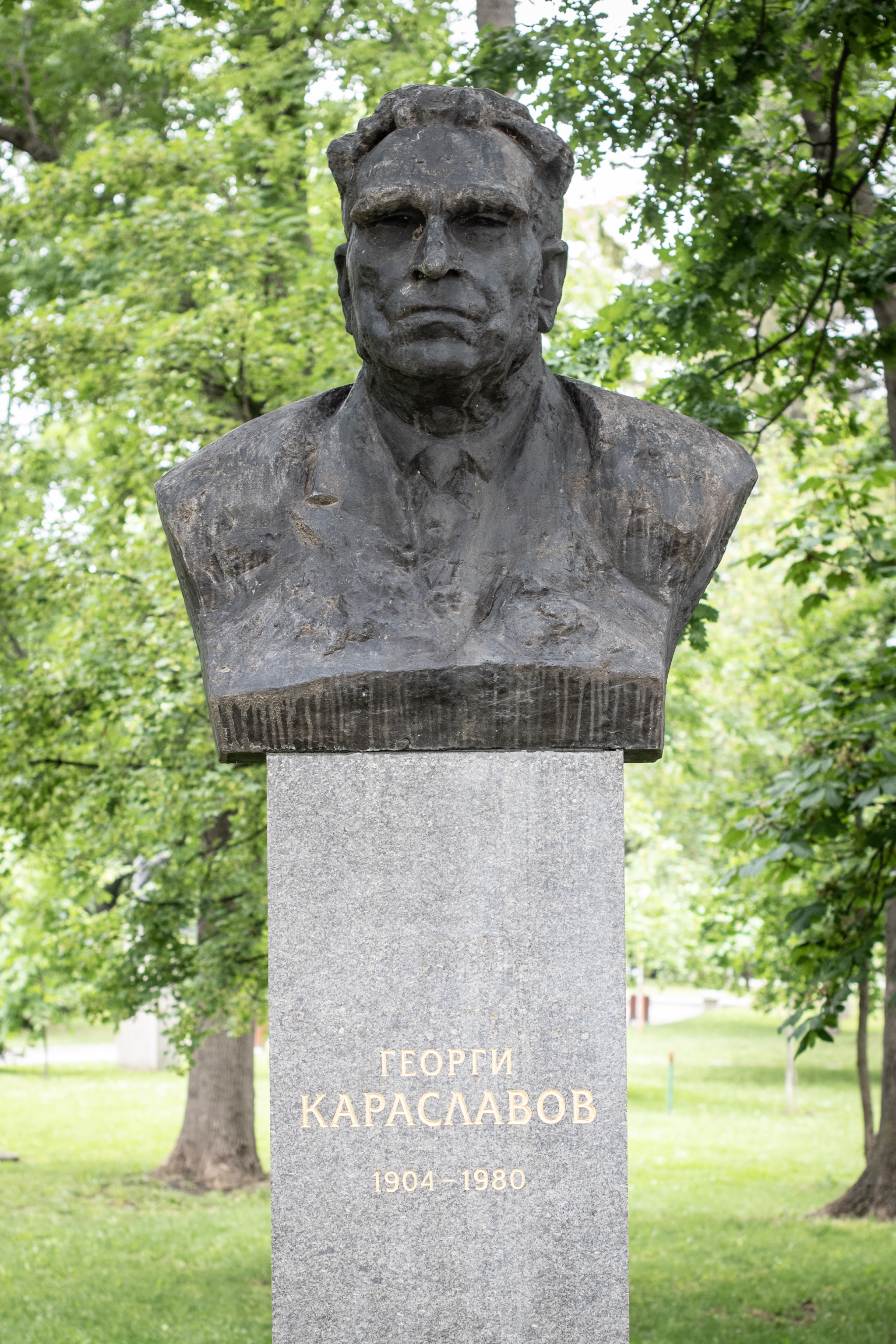 Снимката документира паметника на Георги Караславов в парк "Борисова градина", София.